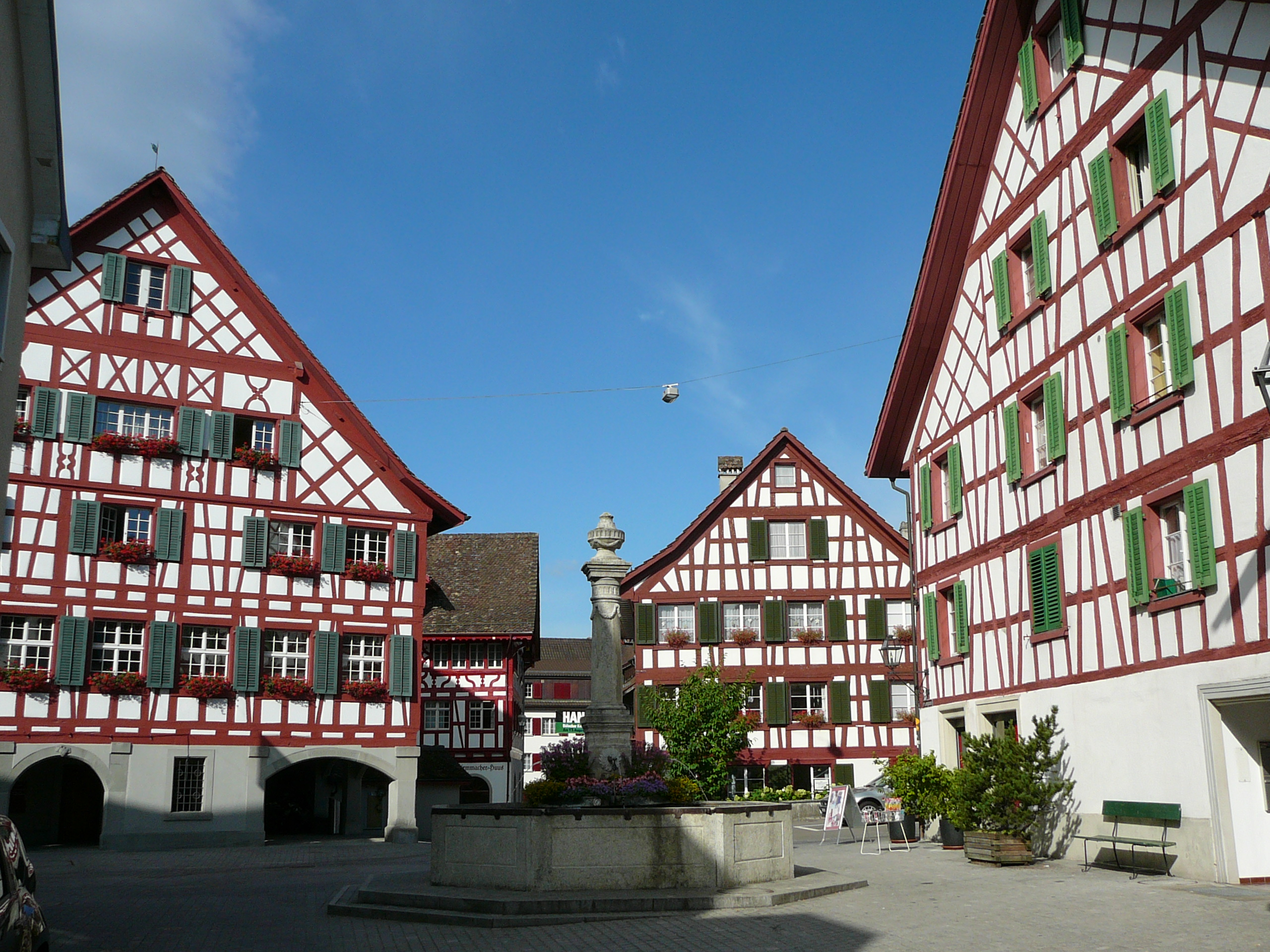 Altstadt von Bülach, Brunngasse Marktgasse